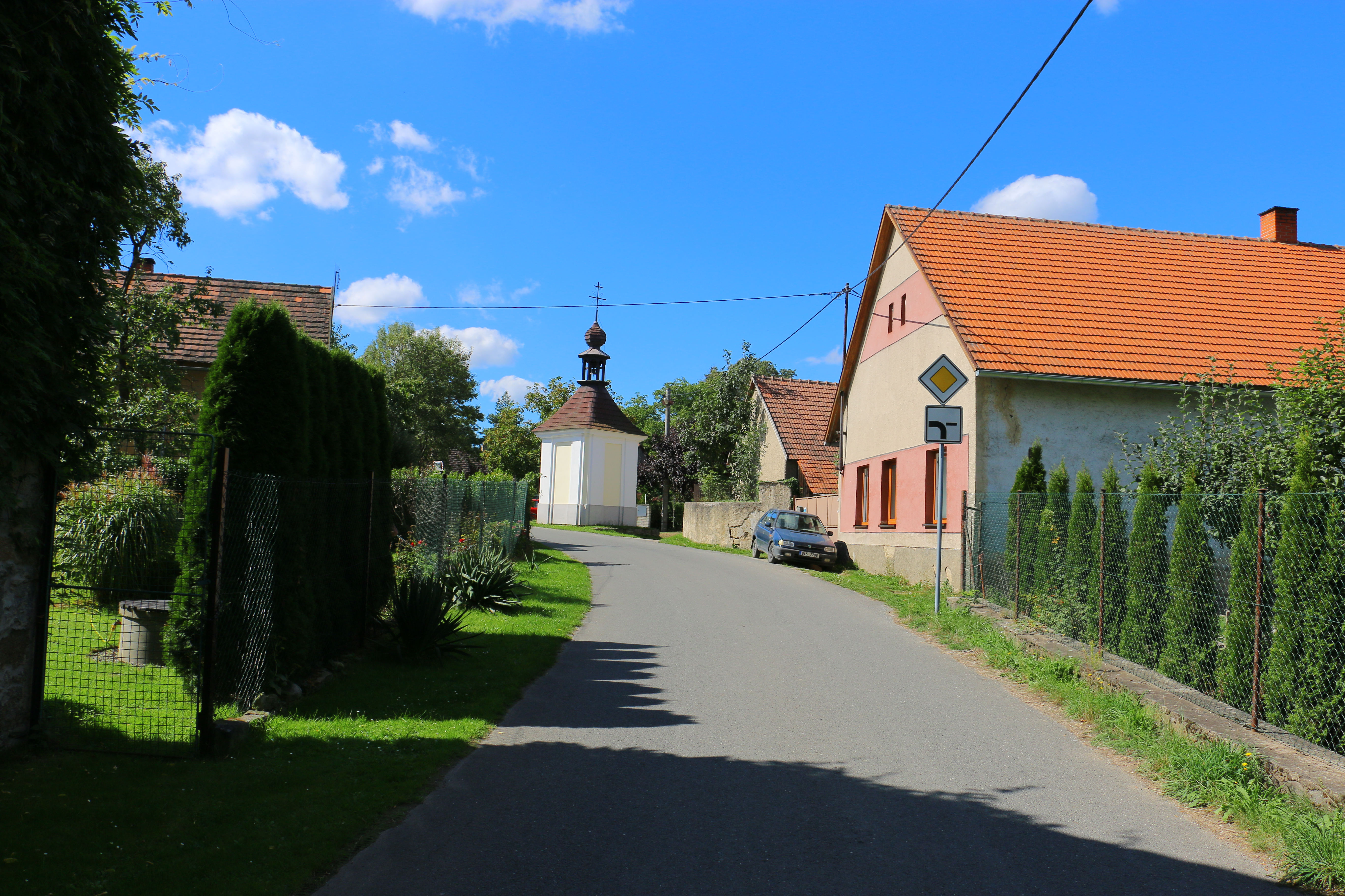 Sledovice, okres Benešov, pohled ke kapličce Project: Fotíme Česko.